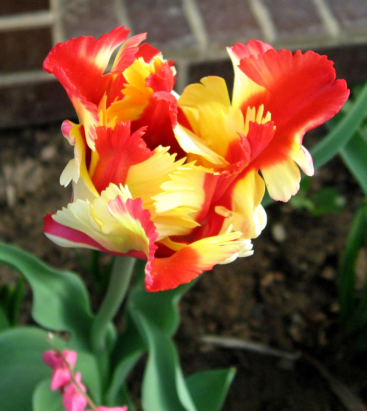 Kvetoucí tulipán